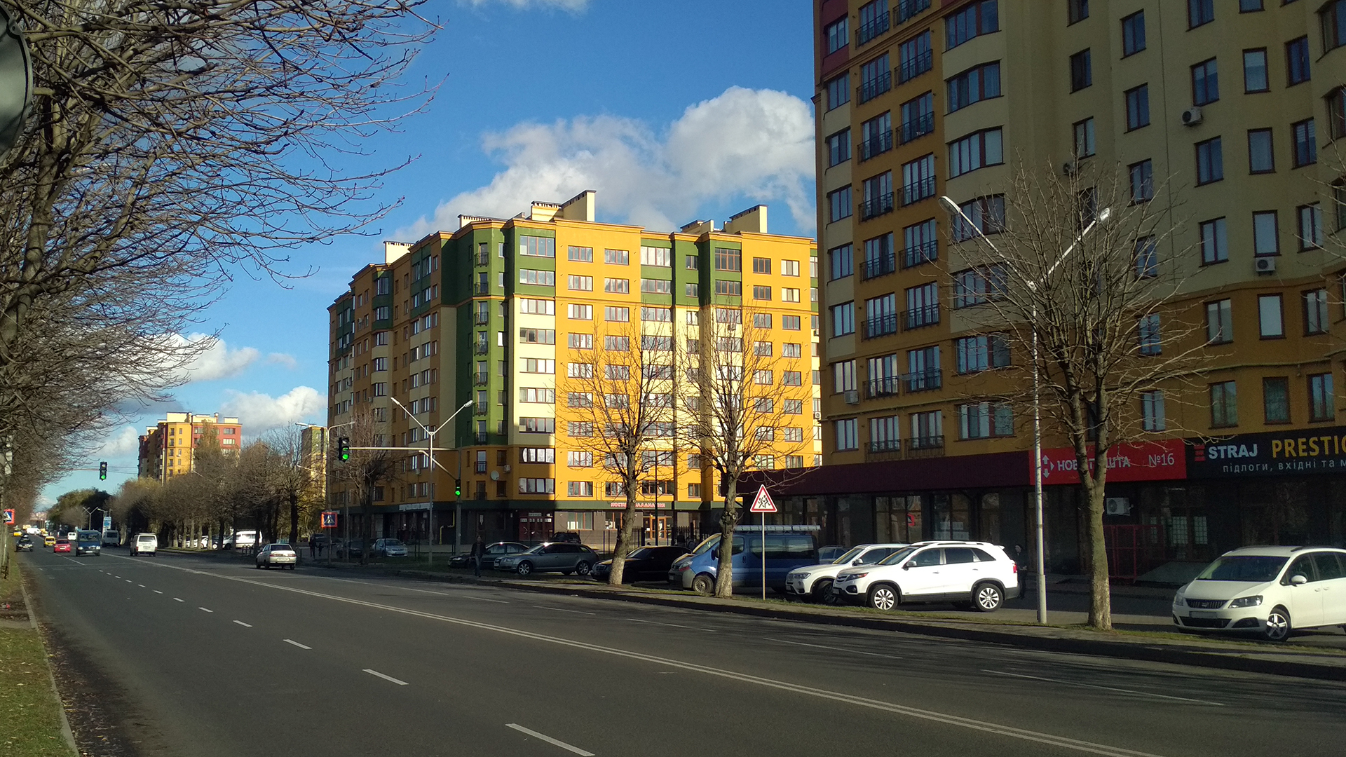 Вулиця Набережна в Луцьку неподалік від перетину з Ковельською